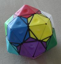 12-color Dogic